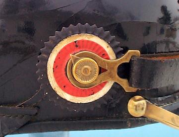 Die 1897 zum 100. Geburtstag des Reichsgründers Kaiser Wilhelm I. (1797–1888) eingeführte schwarz-weiß-rote Kokarde („Reichskokarde“) an einer deutschen Pickelhaube für Mannschaften